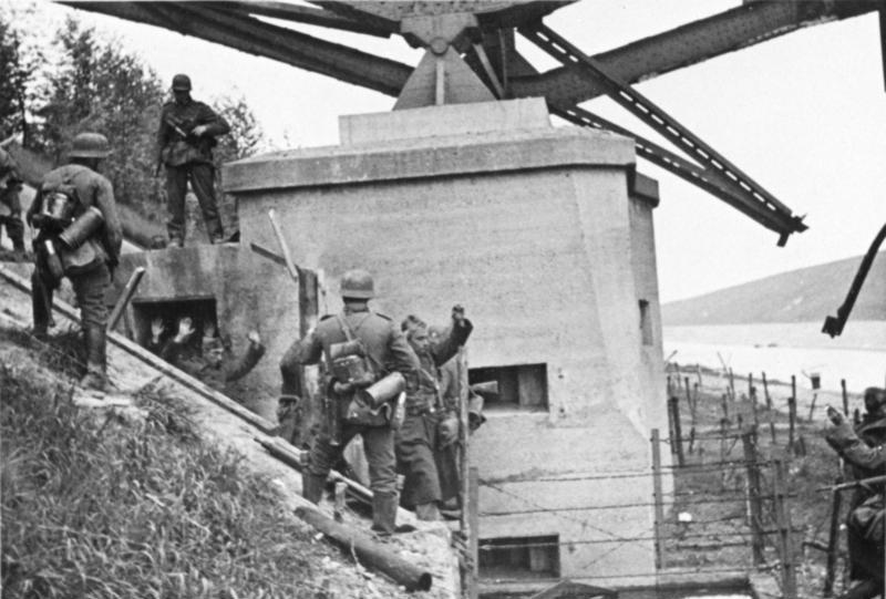 An der Brücke über den Albert-Canal, südlich Veldwezelt. Im Pfeiler der Brücke ist [ein] Bunker eingebaut, aus dem ca. 30 Gefangene geholt werden. 11.5.1940, 10.00 Uhr